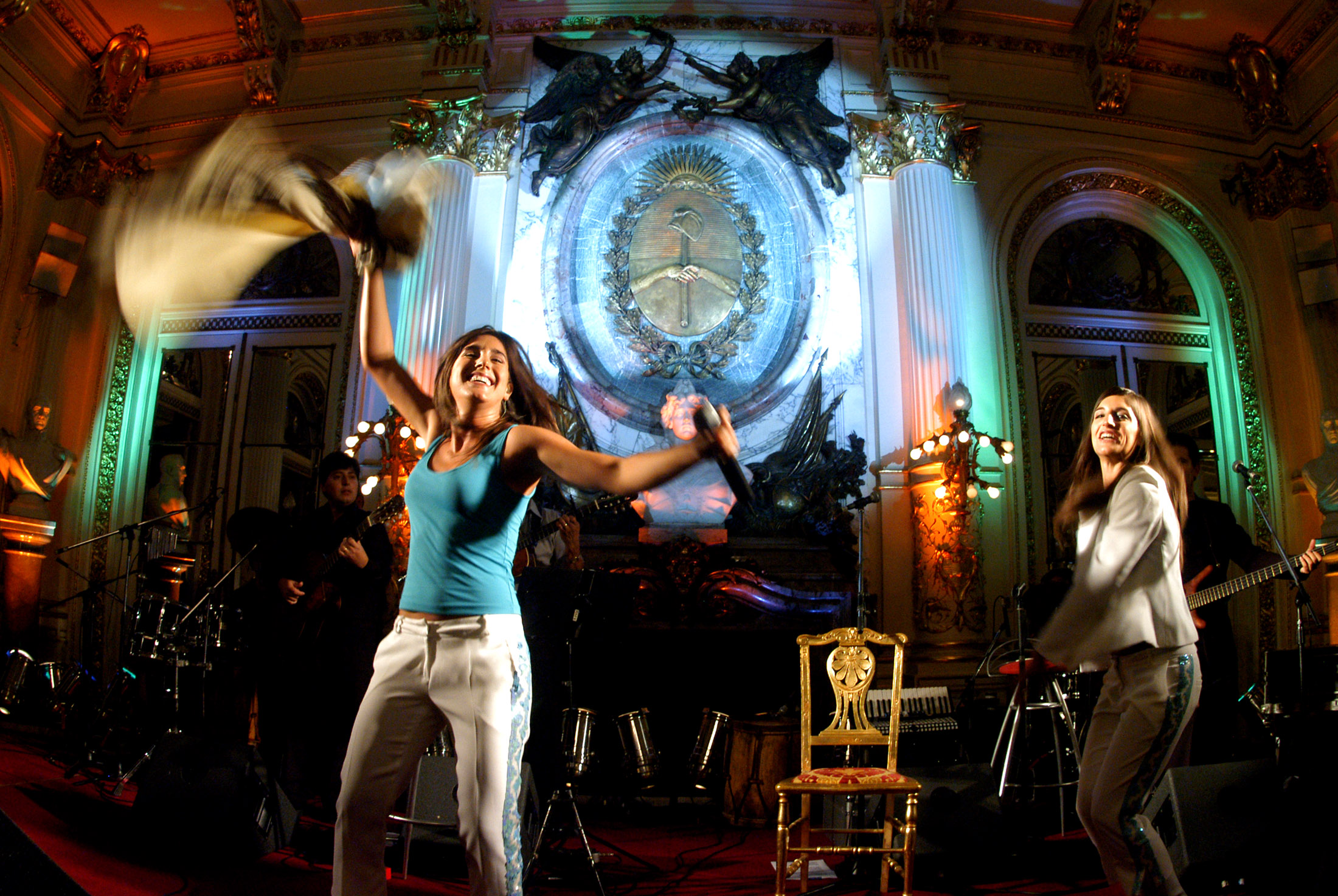 Soledad Pastoruti en Casa Rosada